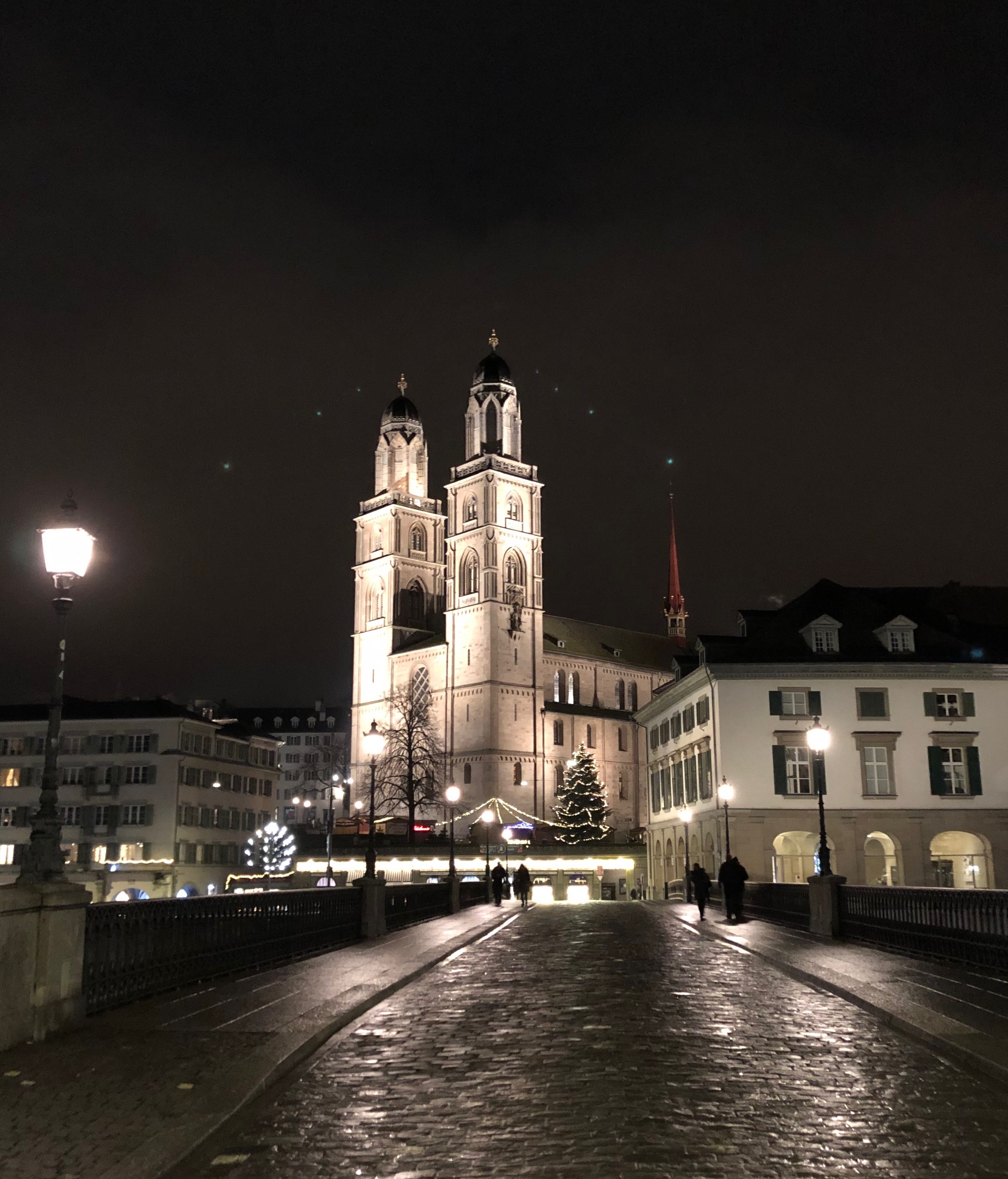 Grossmünster, vorne die Münsterbrücke